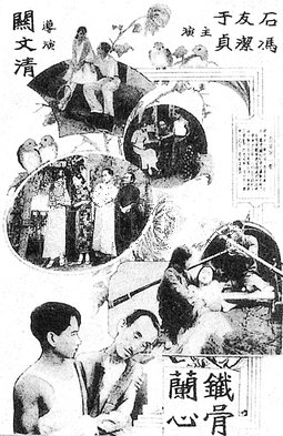 中文（香港）: 1931年11月公映默片《鐵骨蘭心》的宣傳海報，劇照由上至下：（1）富家女蔡麗蘭與紈絝子黃亨利打羽毛球；（2）鐵匠張國強自感身份懸殊，斷然拒絕入贅蔡家；（3）富家女蔡麗蘭寬免小販陸才欠下蔡家的租金；（4）漁人救起遇溺的鐵匠張國強與富家女蔡麗蘭；（5）孝順的鐵匠張國強著父親早點睡覺，讓他獨自完成工作。